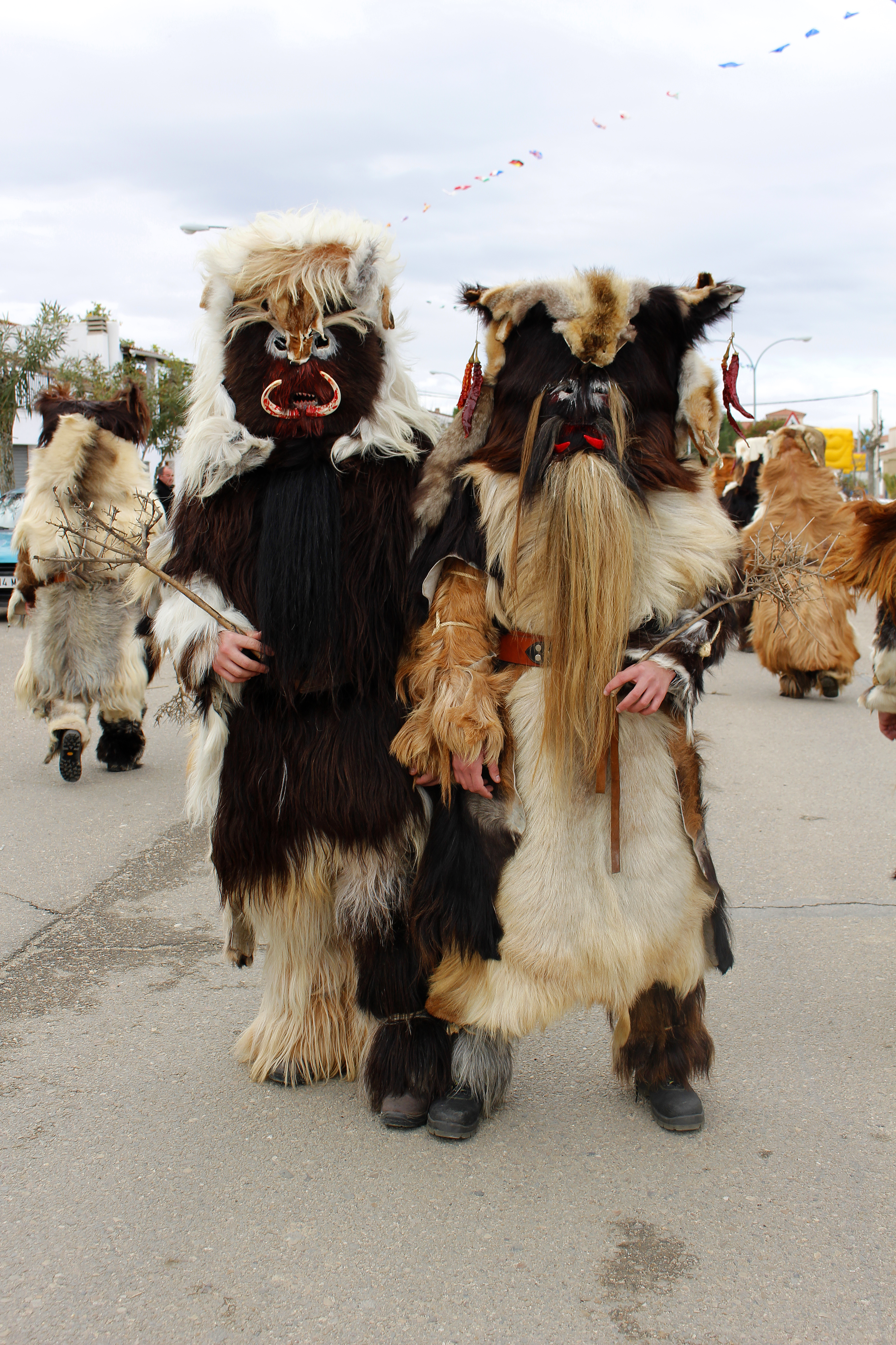 tradición